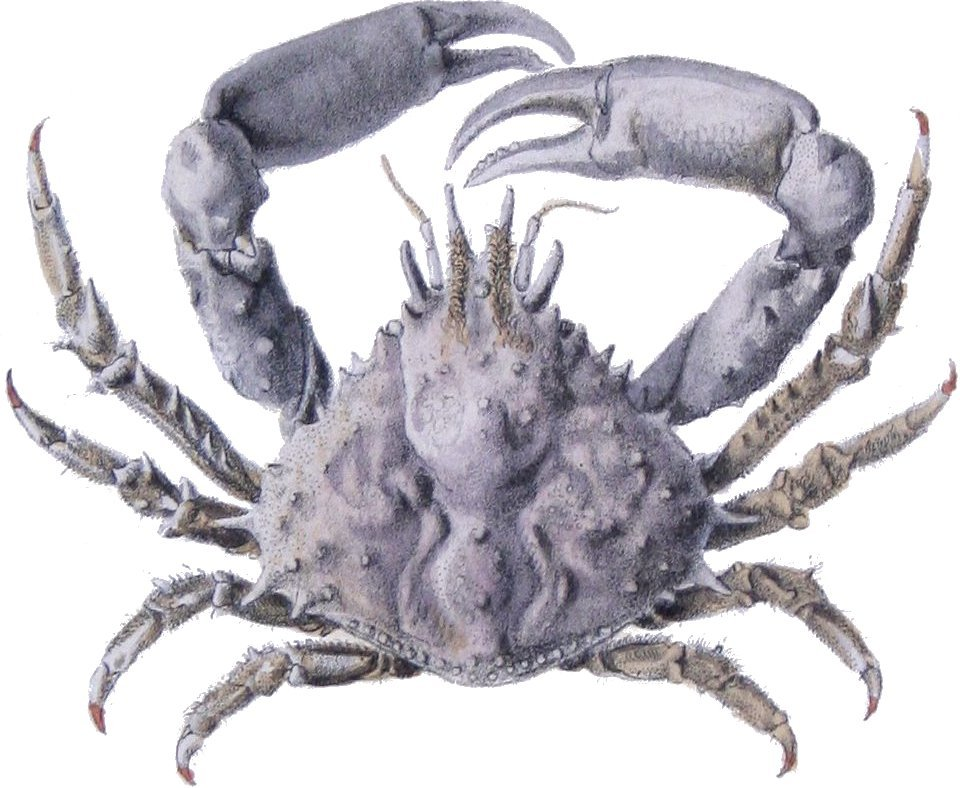 Microphys weddellii Edw. = Microphrys weddelli H. Milne Edwards, 1851